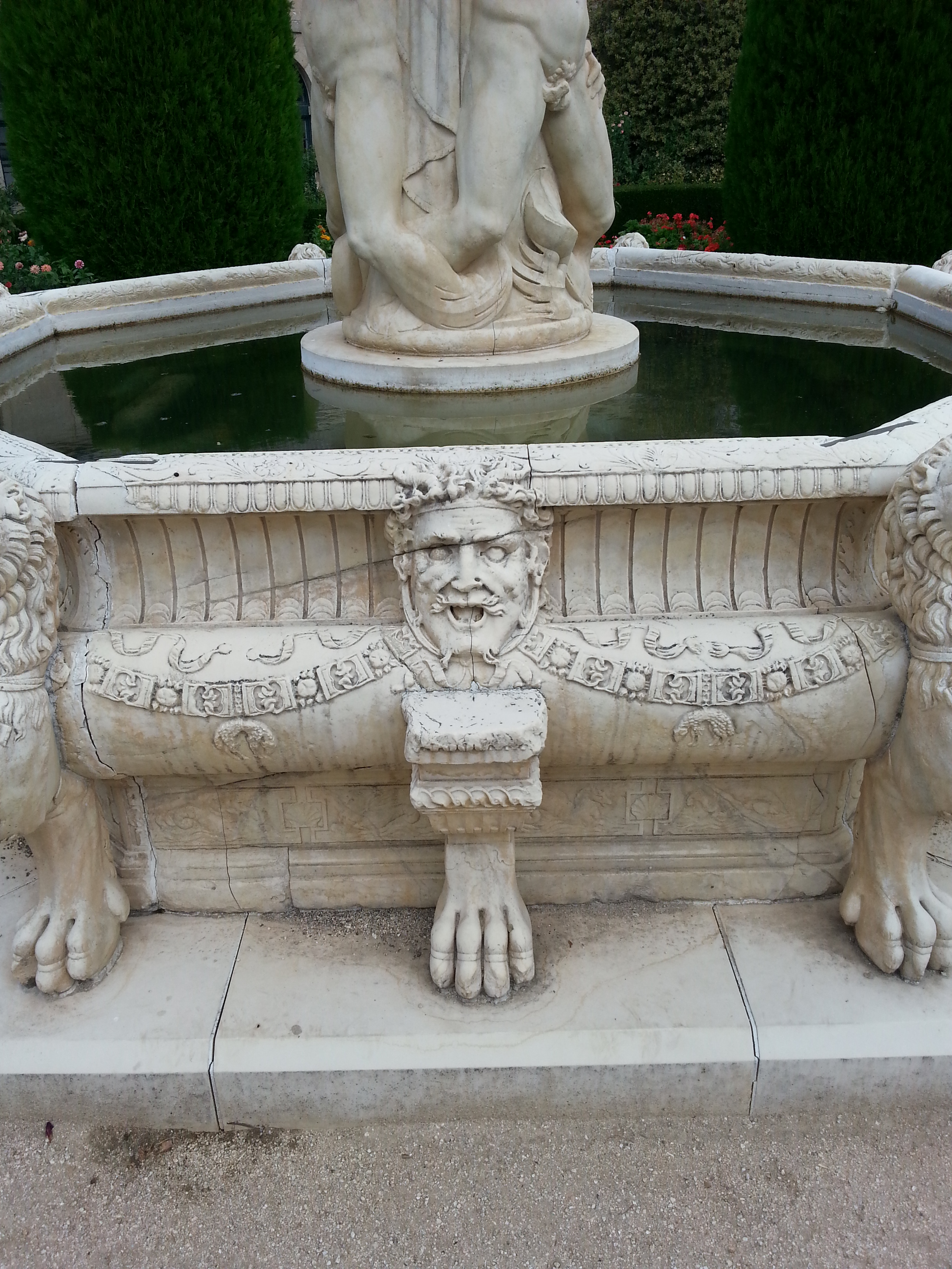 Fuente del Águila: atribuida al escultor Giovanni Angelo Montorsoli fue encargada por Felipe II para el Jardín de la Casa de Campo de Madrid, donde se encontraba instalada en 1584. Su cuerpo central se trasladó a la Universidad de El Escorial en 1895. Con motivo del IV Centerario del fallecimiento del rey Felipe II la Sociedad Estatal para la conmemoración de los Centenarios de Felipe II y Carlos V financió y la restauración y reproducción completa de esta Fuente. La reproducción, conforme al modelo original, se instaló en le Claustrro de esta Universidad en septiembre del año 2000.